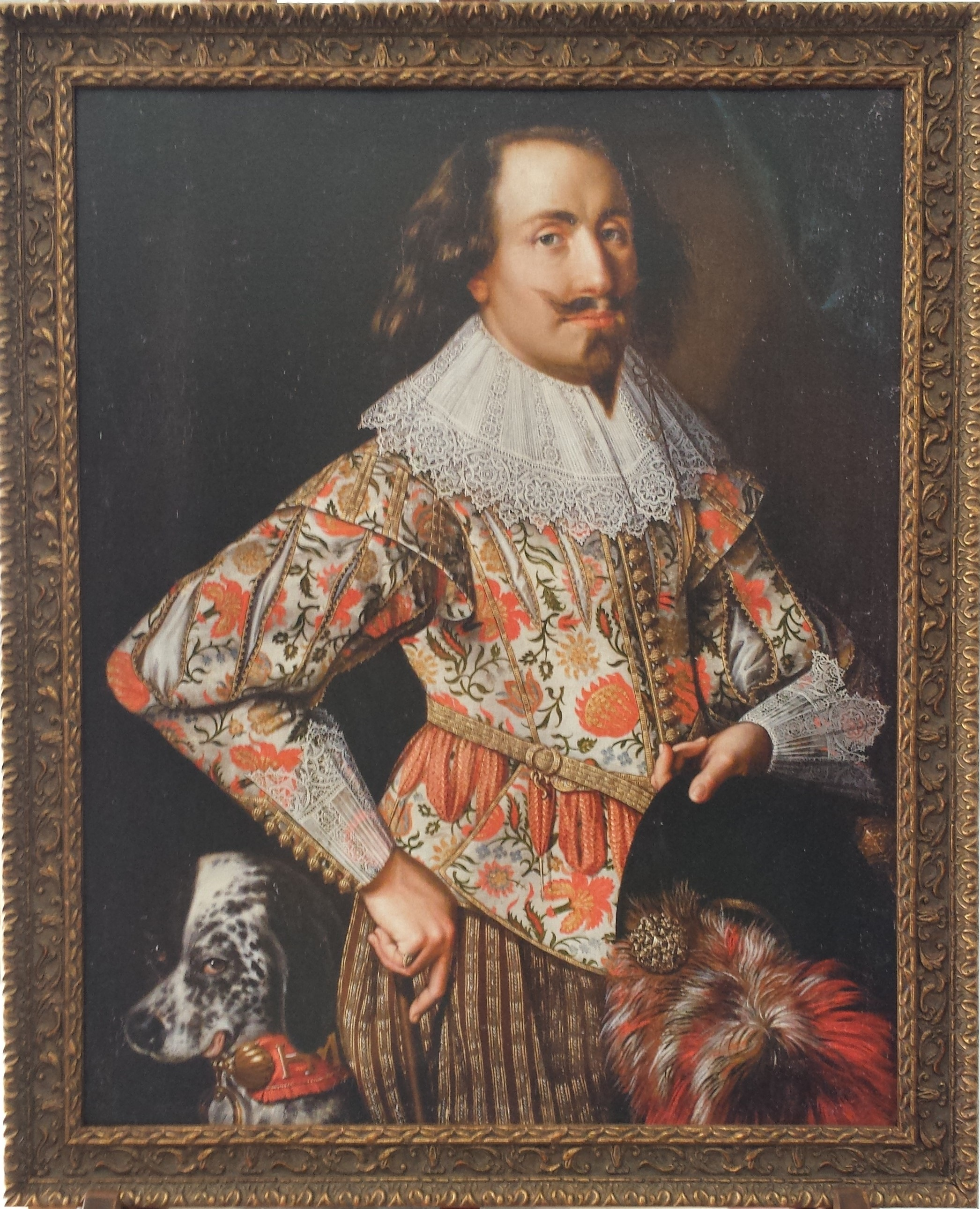 graaf Johan Martin van Stolberg (1594-1669)